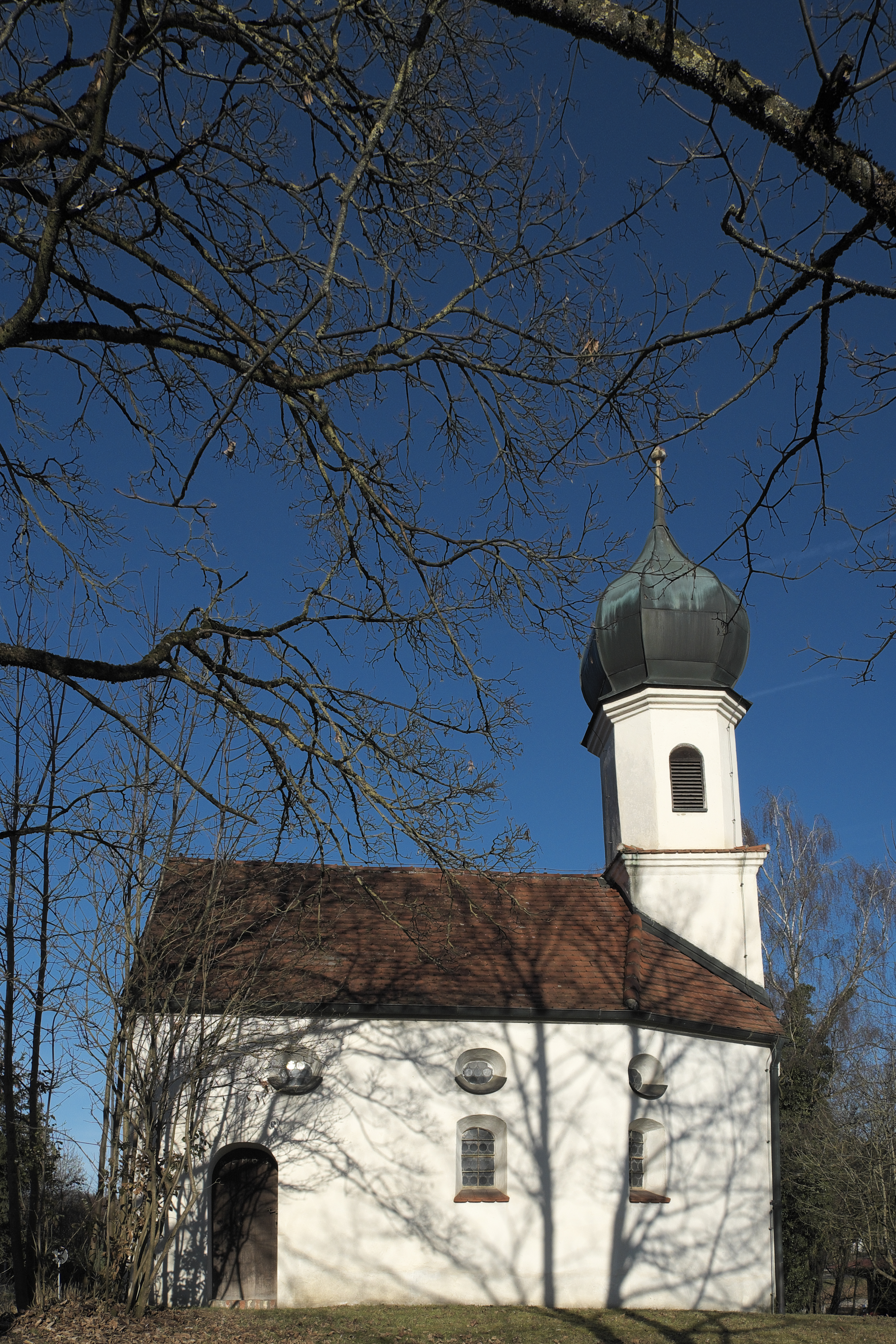 Kapelle in Niernsdorf, einem Ortsteil von Hohenkammer im Landkreis Freising (Bayern/Deutschland)